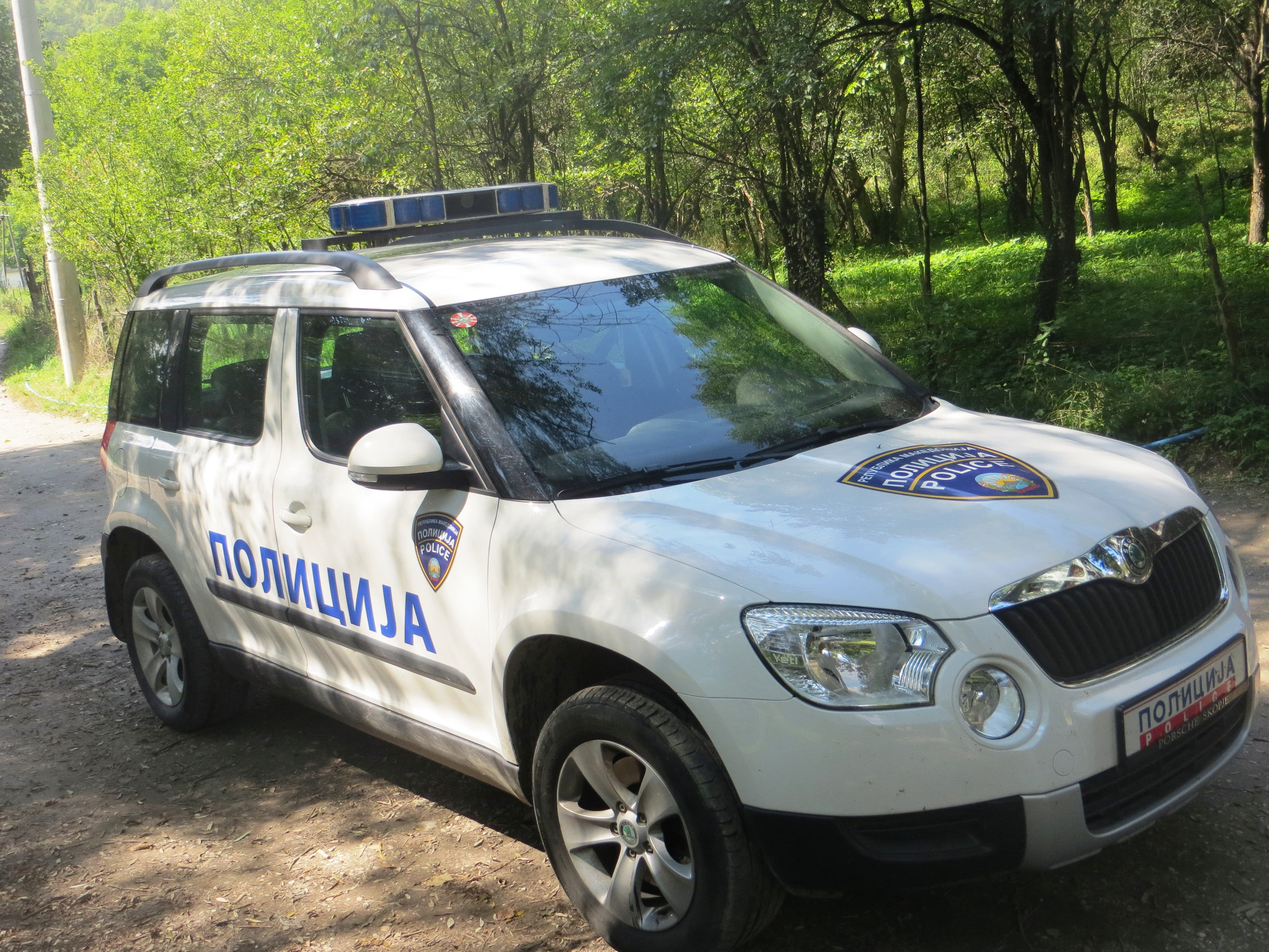 Politie auto uit Macedonië